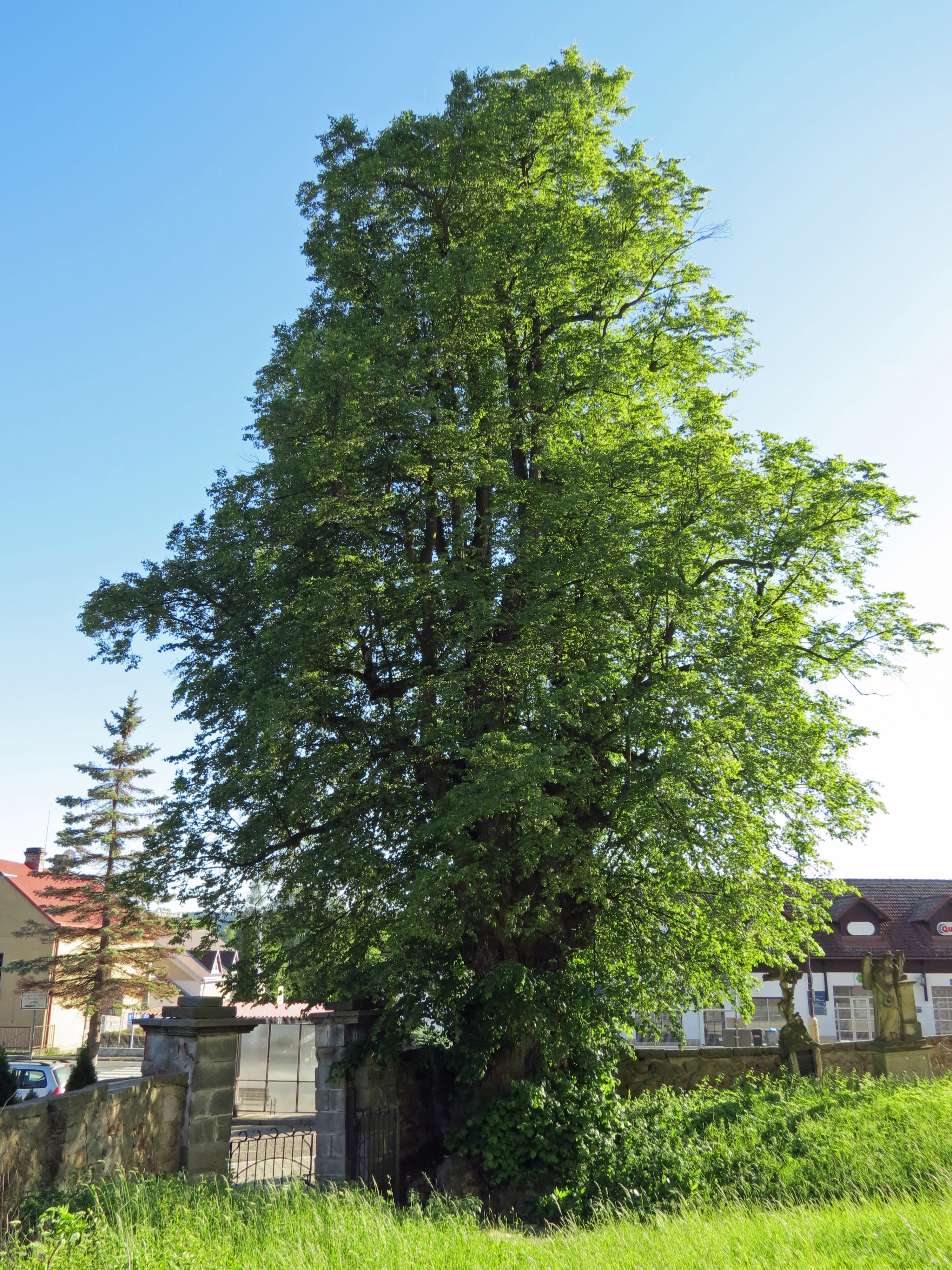 Lípa v Choustníkově Hradišti2